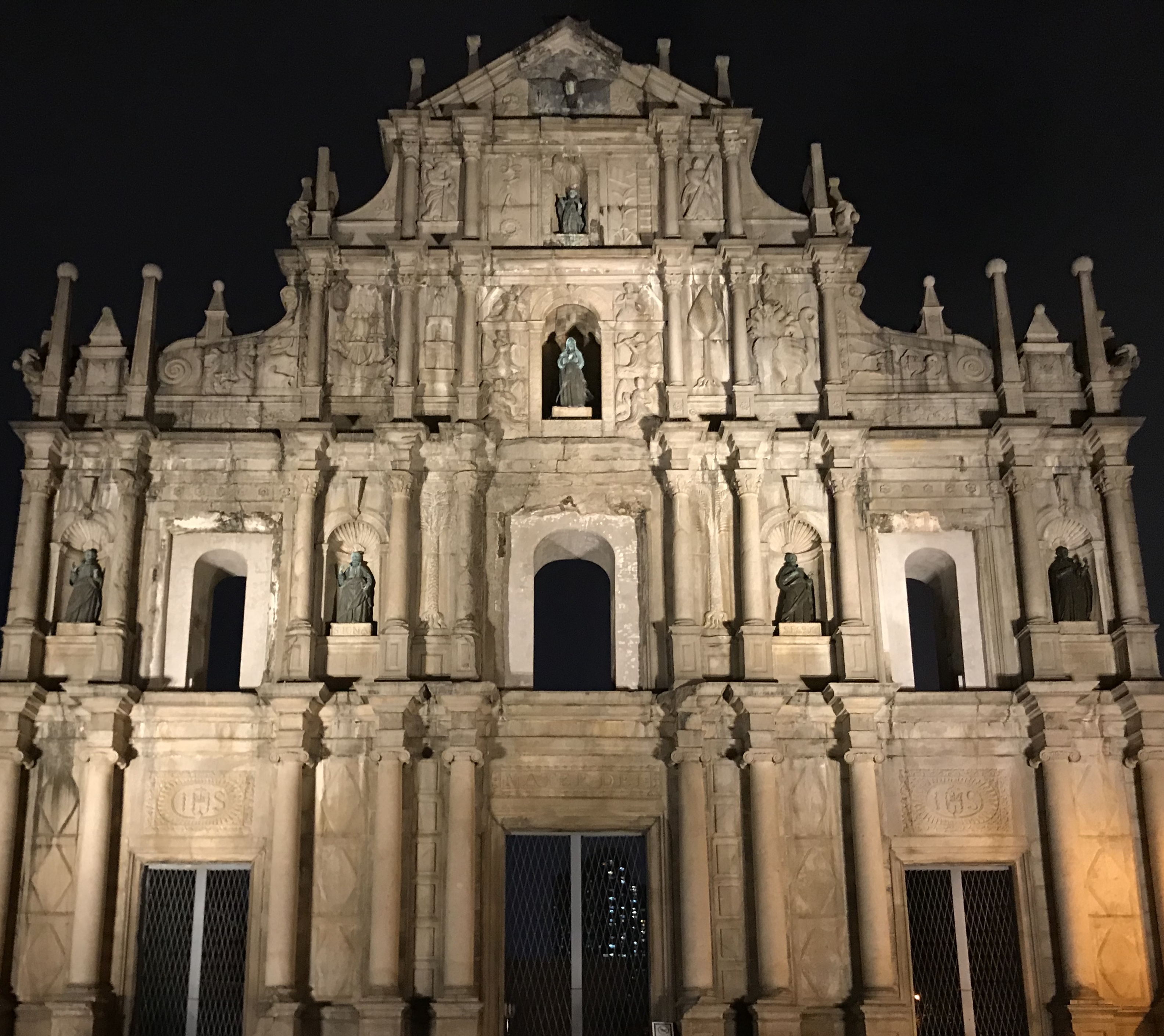 中文（台灣）: 晚上的大三巴牌坊上的石雕和銅像。